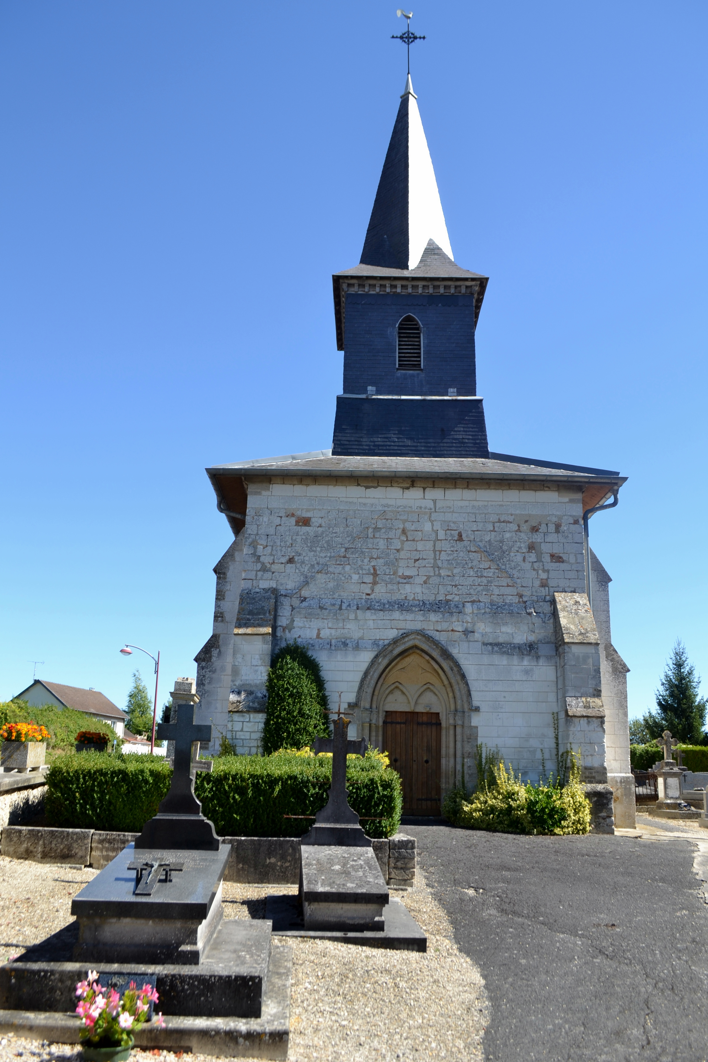 Eglise de Saint-Jean-sur-Moivre (51).